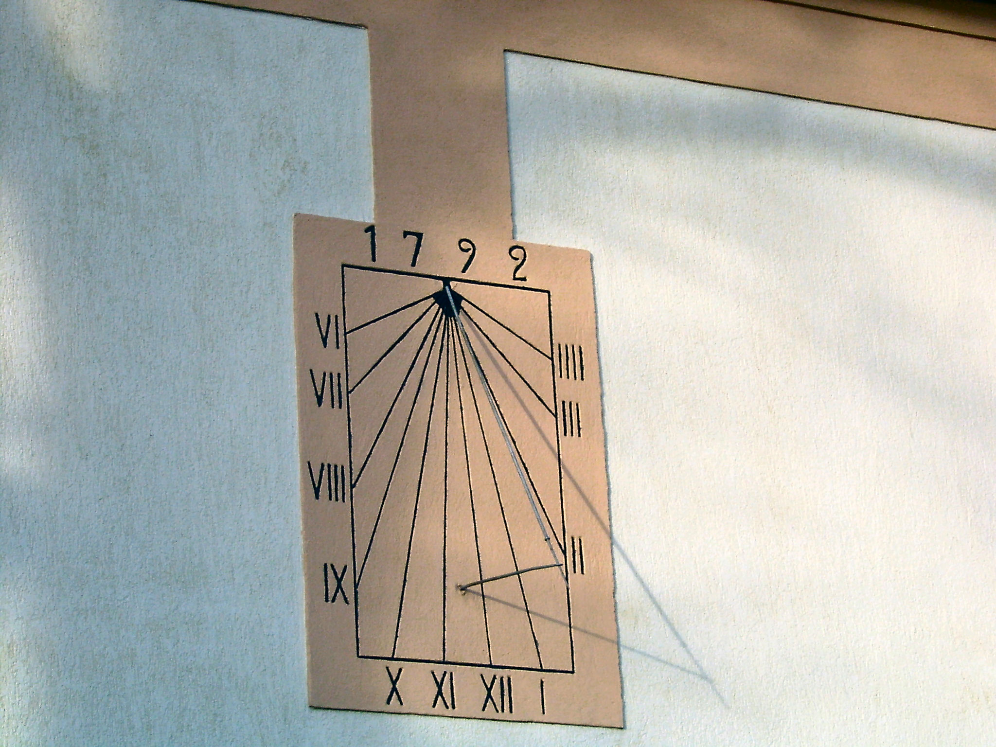 Wyszanowo, powiat międzyrzecki, woj. lubuskie, Poland